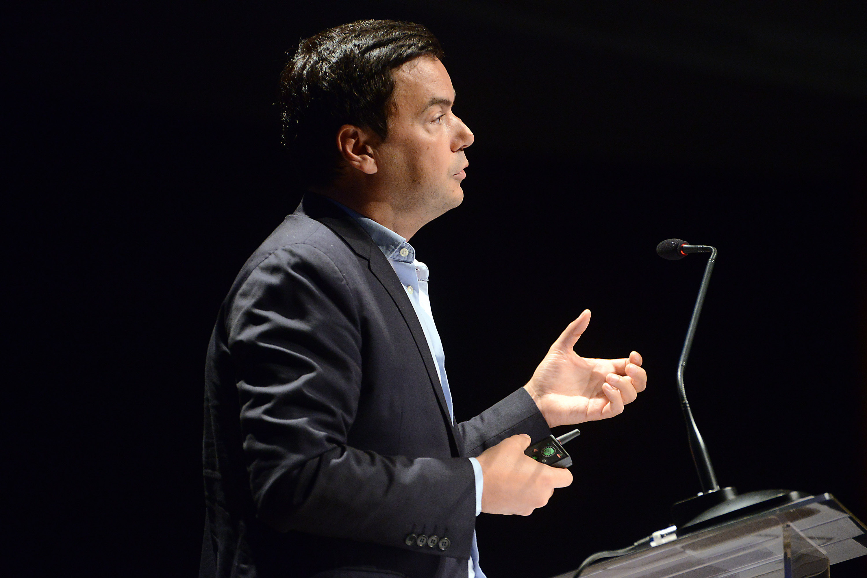 Convidado: Thomas Piketty, economista francês Data: 28 de outubro de 2017 Local: Auditório Araújo Vianna Crédito das imagens: Fronteiras do Pensamento / Luiz Munhoz